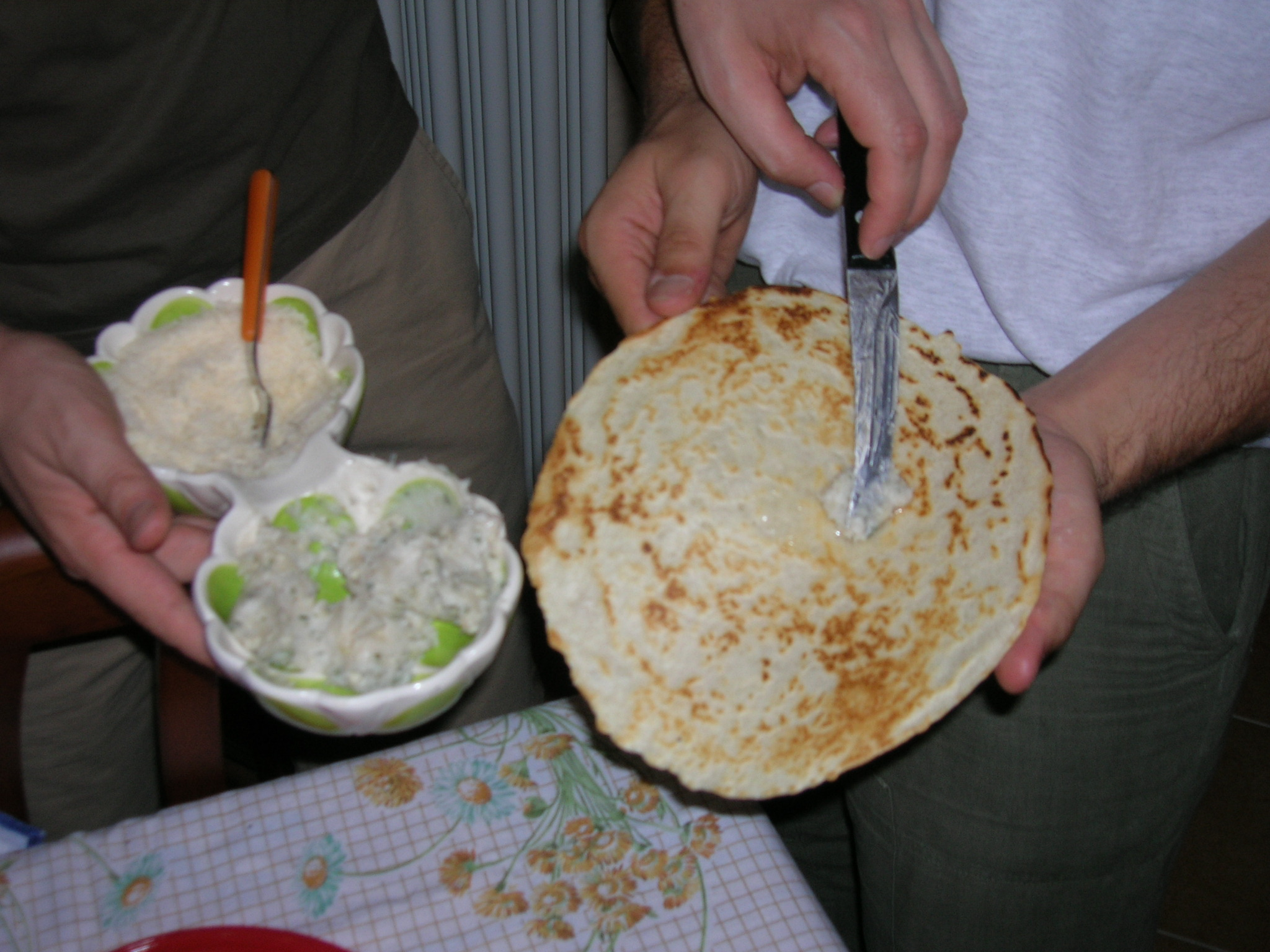 Il borlengo viene condito in mano perché non si raffreddi, con il tipico pesto di lardo di maiale, aglio e rosmarino